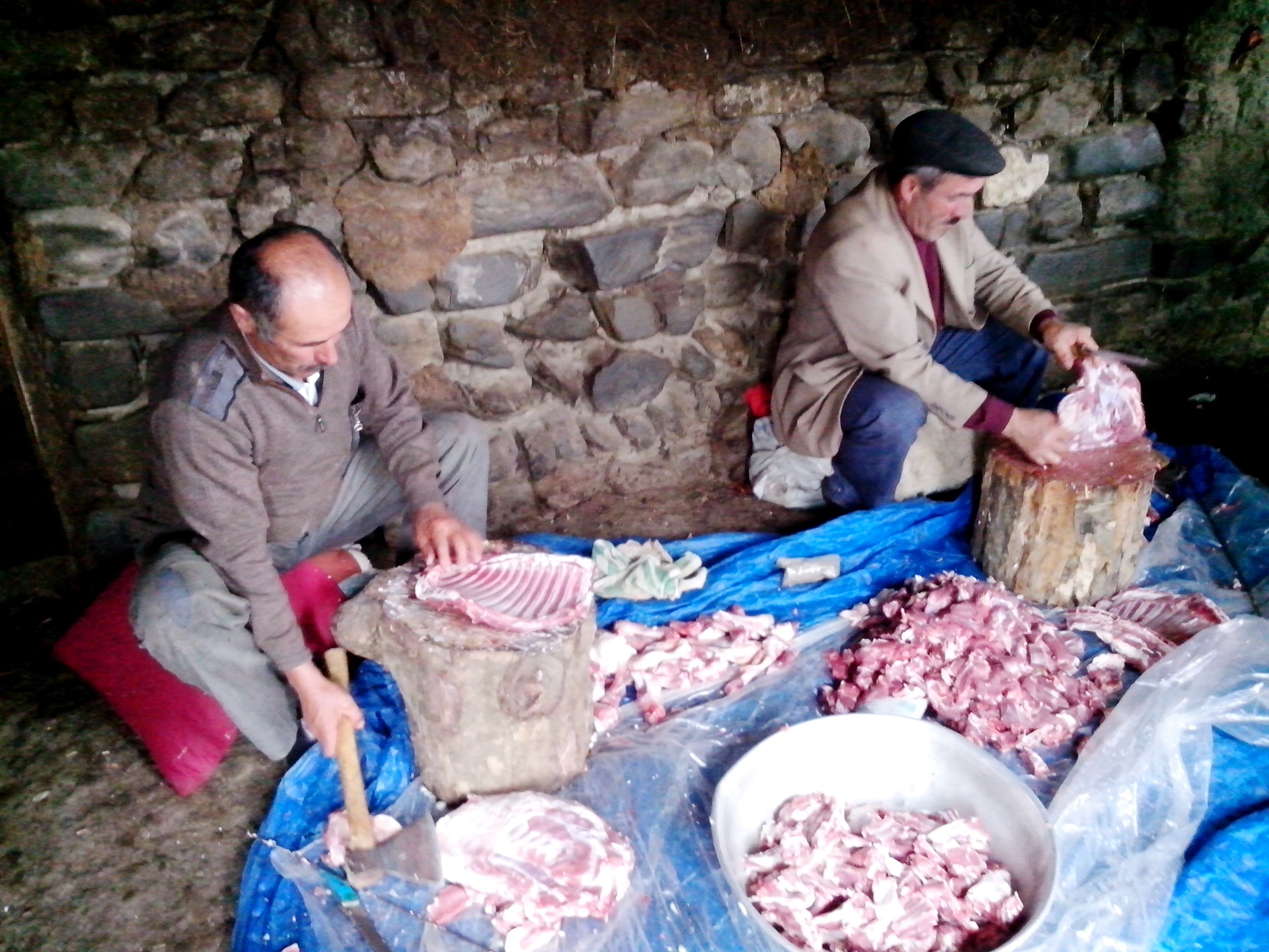 Haput kəndində toy hazırlığı - ətin doğranması